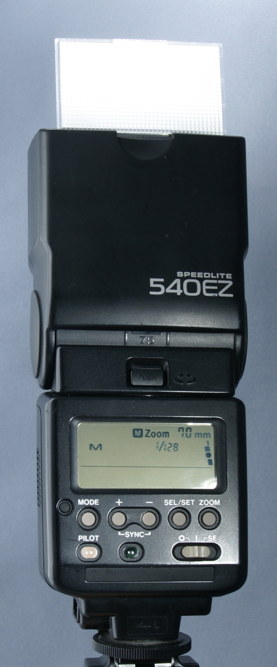 Canon Speedlite 540EZ back-side